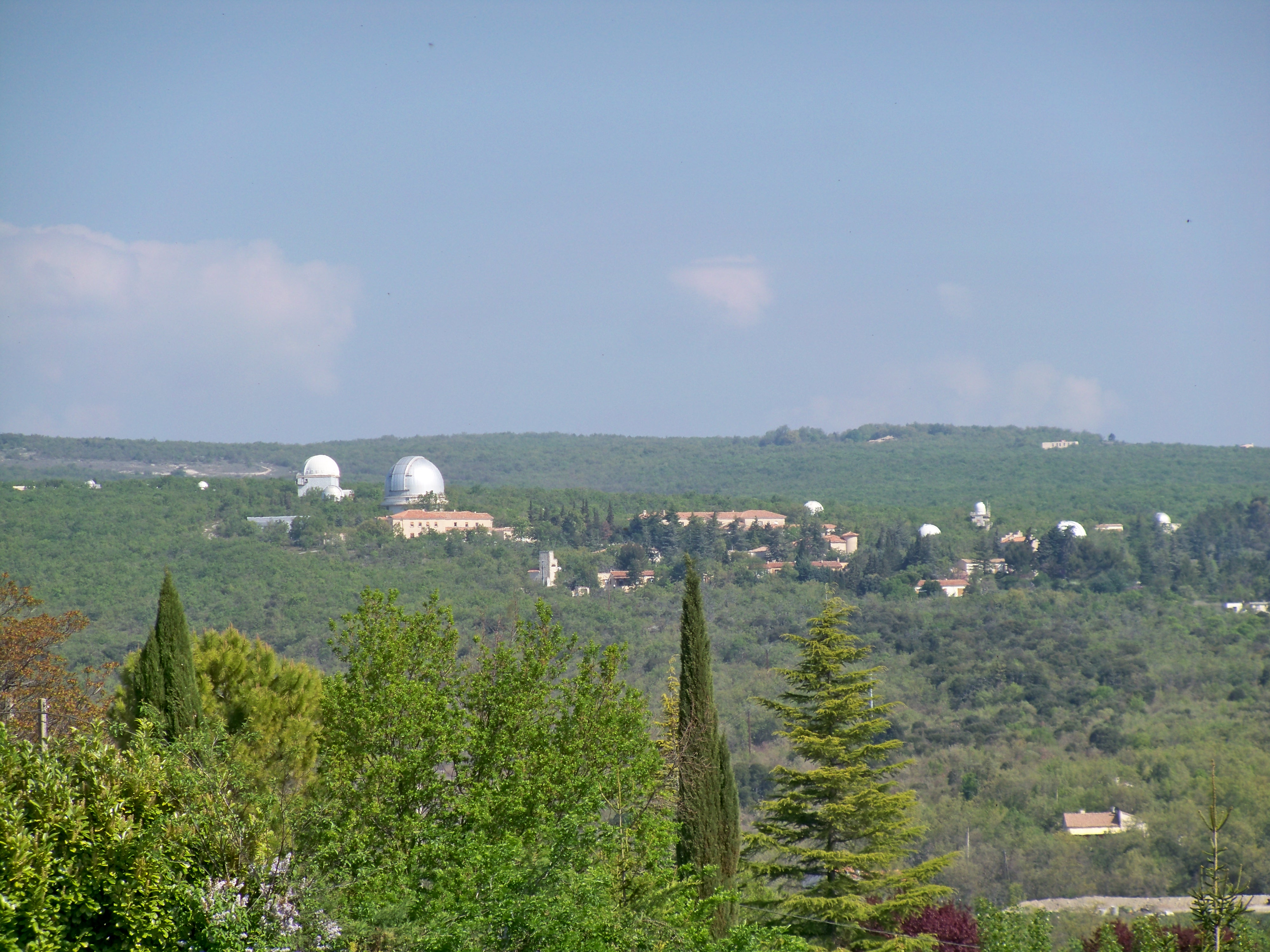 vue sur l'Observatoire deSaint Michel (04)